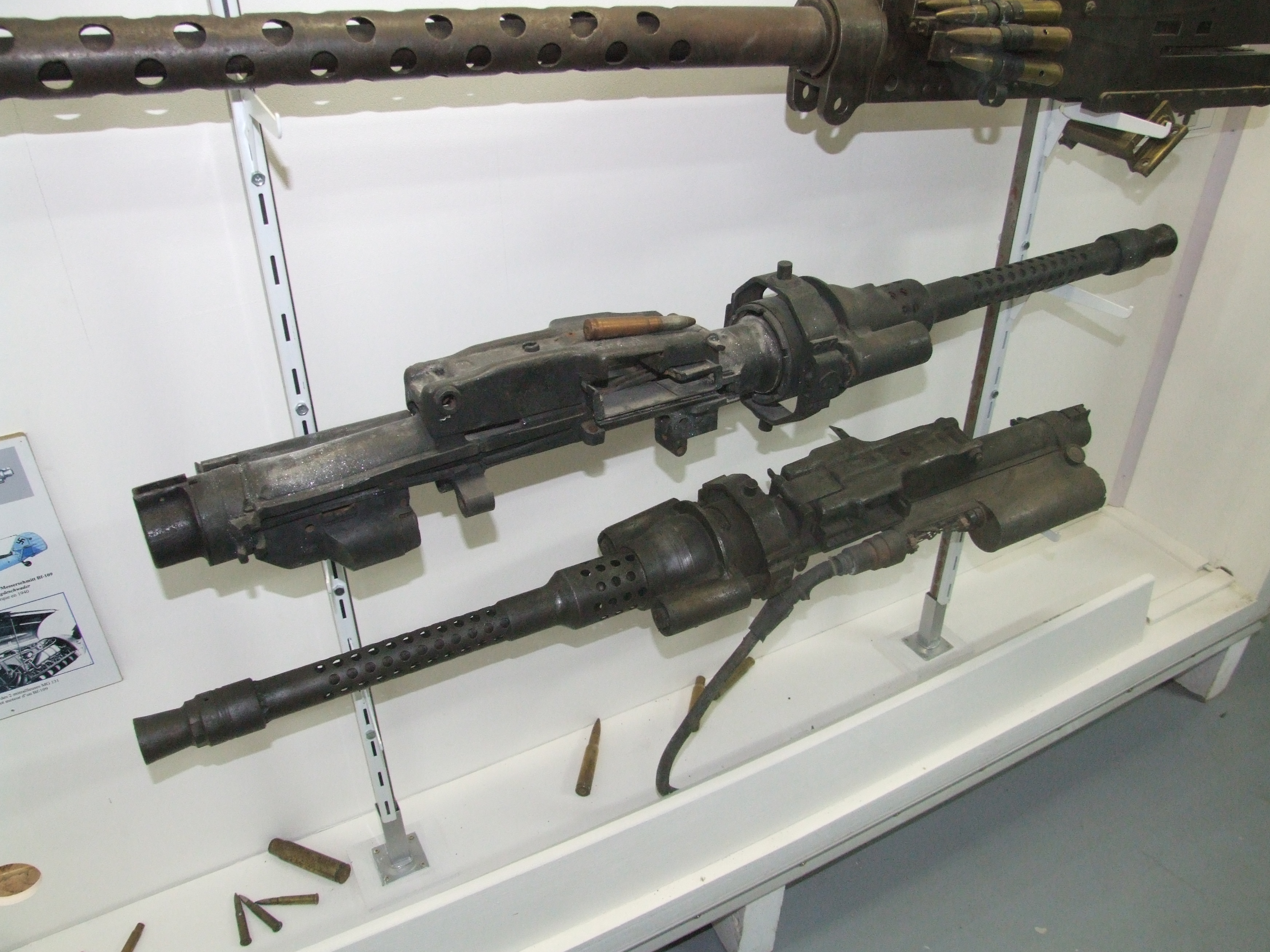 Rheinmetall Borsig MG 131 (13 mm) im Mémorial du Souvenir, Dünkirchen